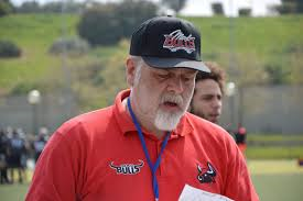 coach difesa